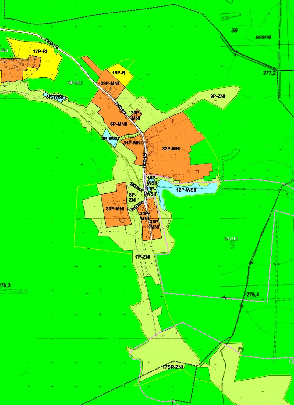 Fragment miejscowego planu zagospodarowania przestrzennego północnych dzielnic miasta Tarnowskie Góry – Opatowice, Rybna, Strzybnica, Pniowiec, Sowice, części Lasowic na północ od ulicy Częstochowskiej i terenów leśnych obejmujący Tłuczykąt